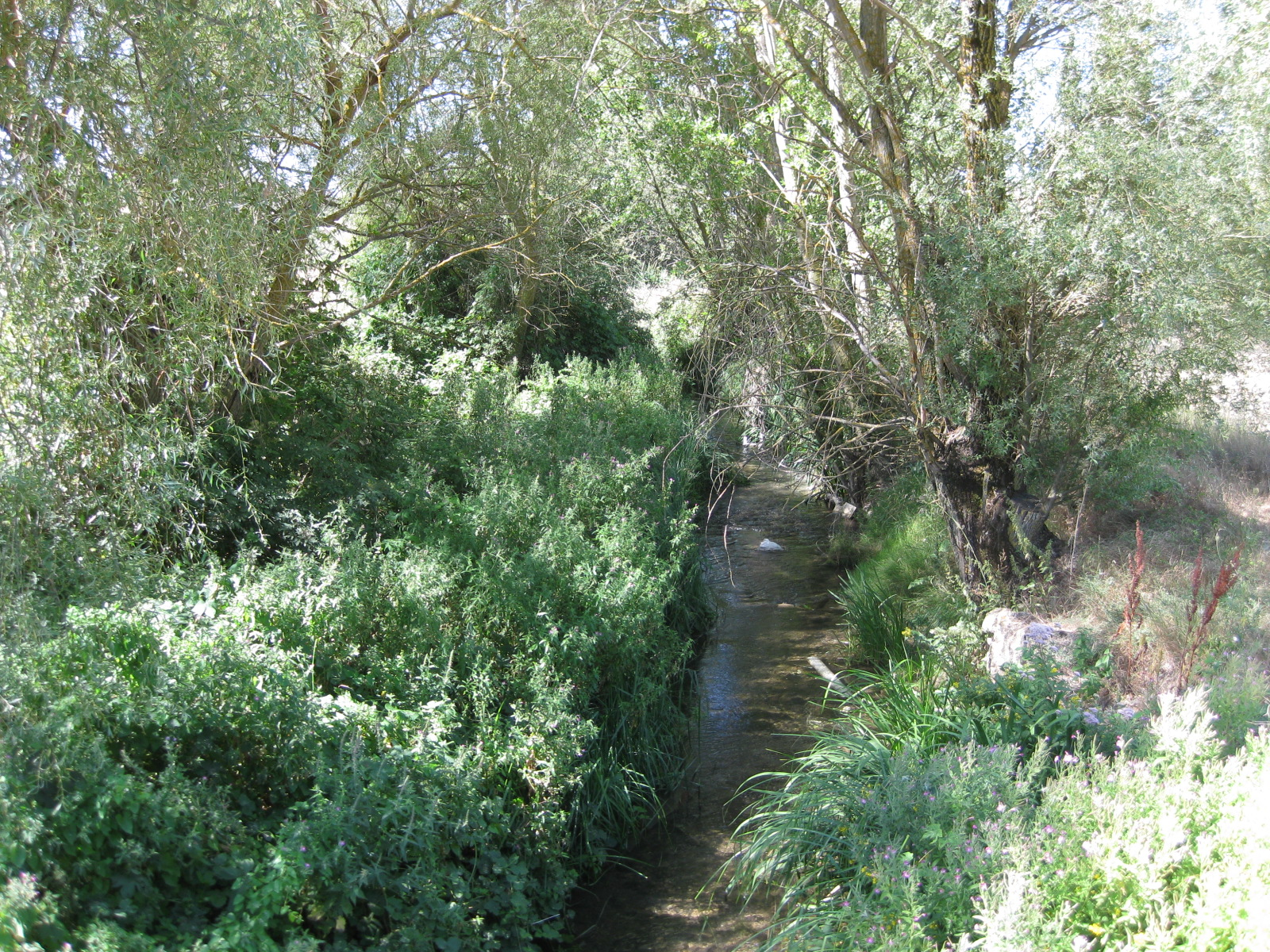 Río Arandilla a su paso por Quintanarraya (Burgos)